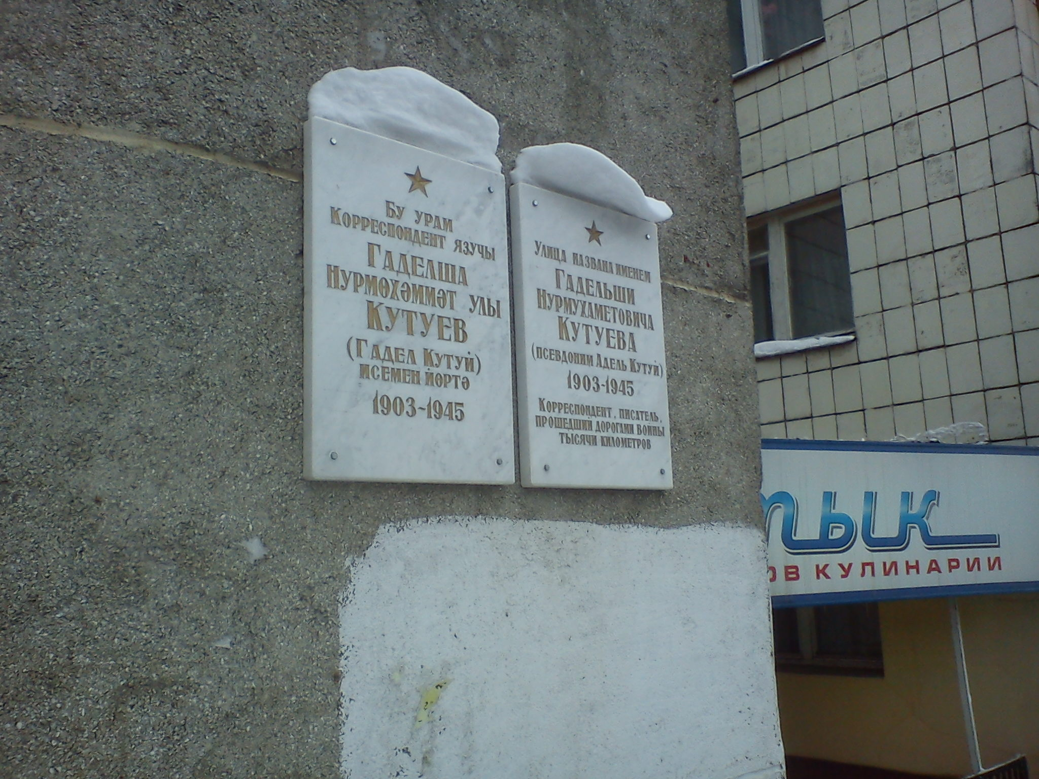 Мемориальная доска Аделю Кутую